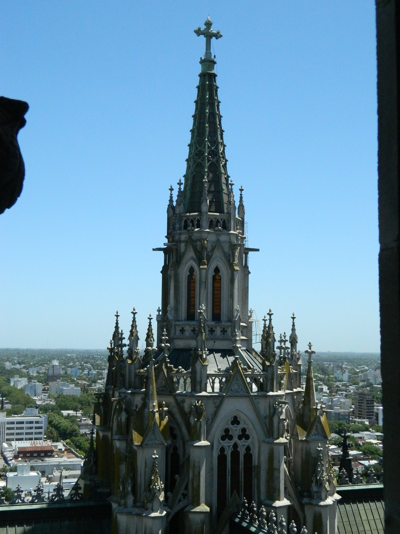 Cúpula de la Iglesia, vista desde el mirador.